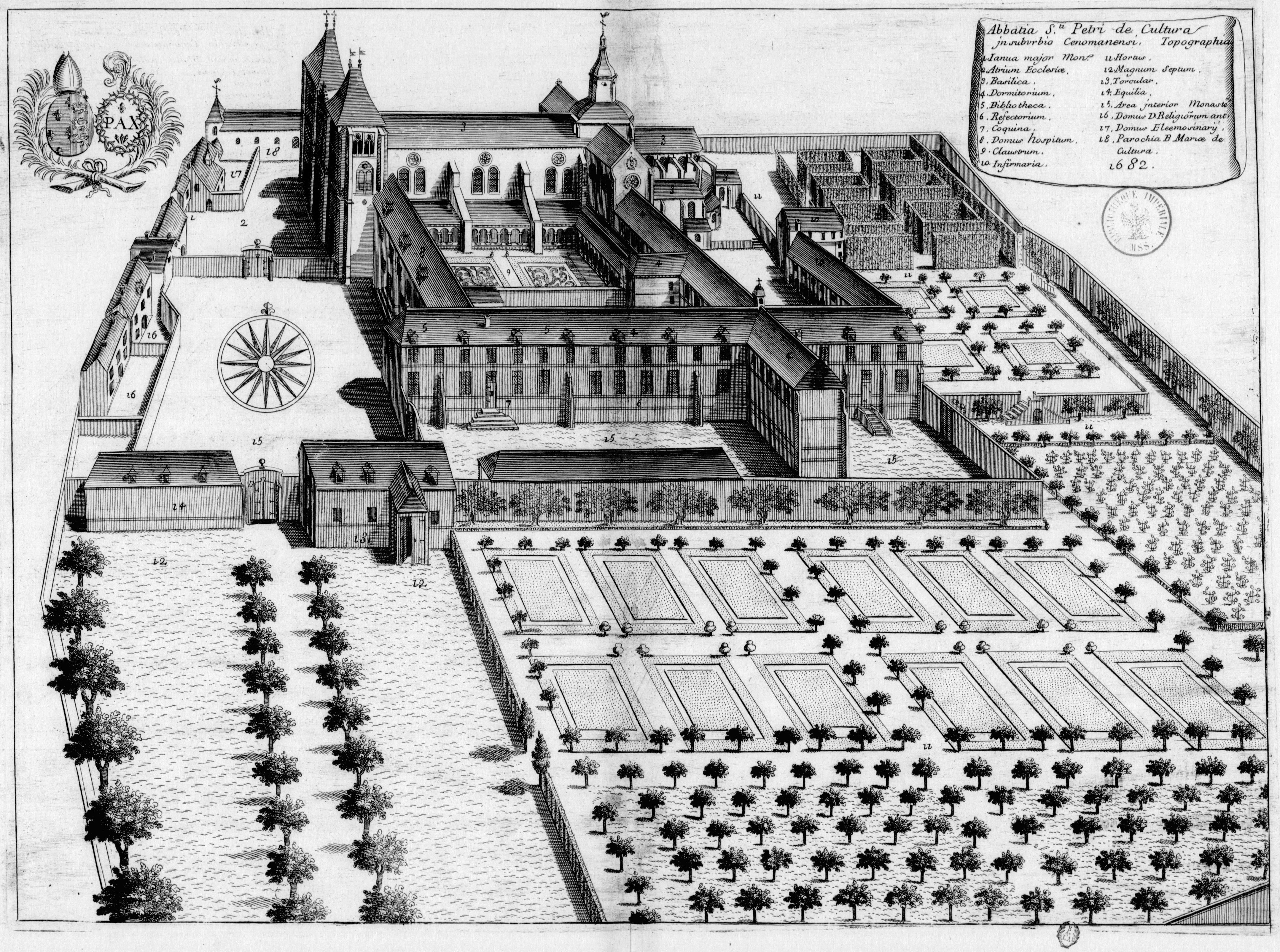 Planche gravée du 17ème siècle représentant l'abbaye Saint-Pierre de la Couture du Mans, en France, dans le livre Monasticon Gallicanum.